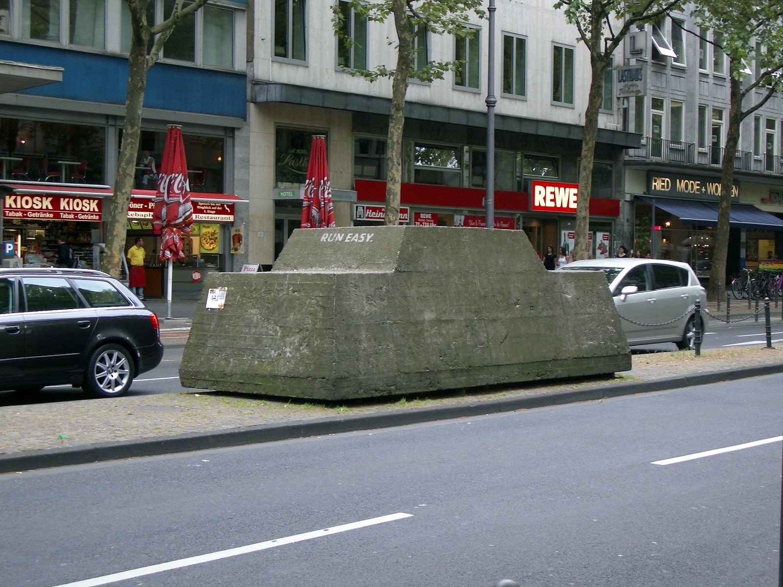 Skulptur Ruhender Verkehr, Blick von Nordwesten von Wolf Vostell (1969) am Hohenzollernring in Köln.